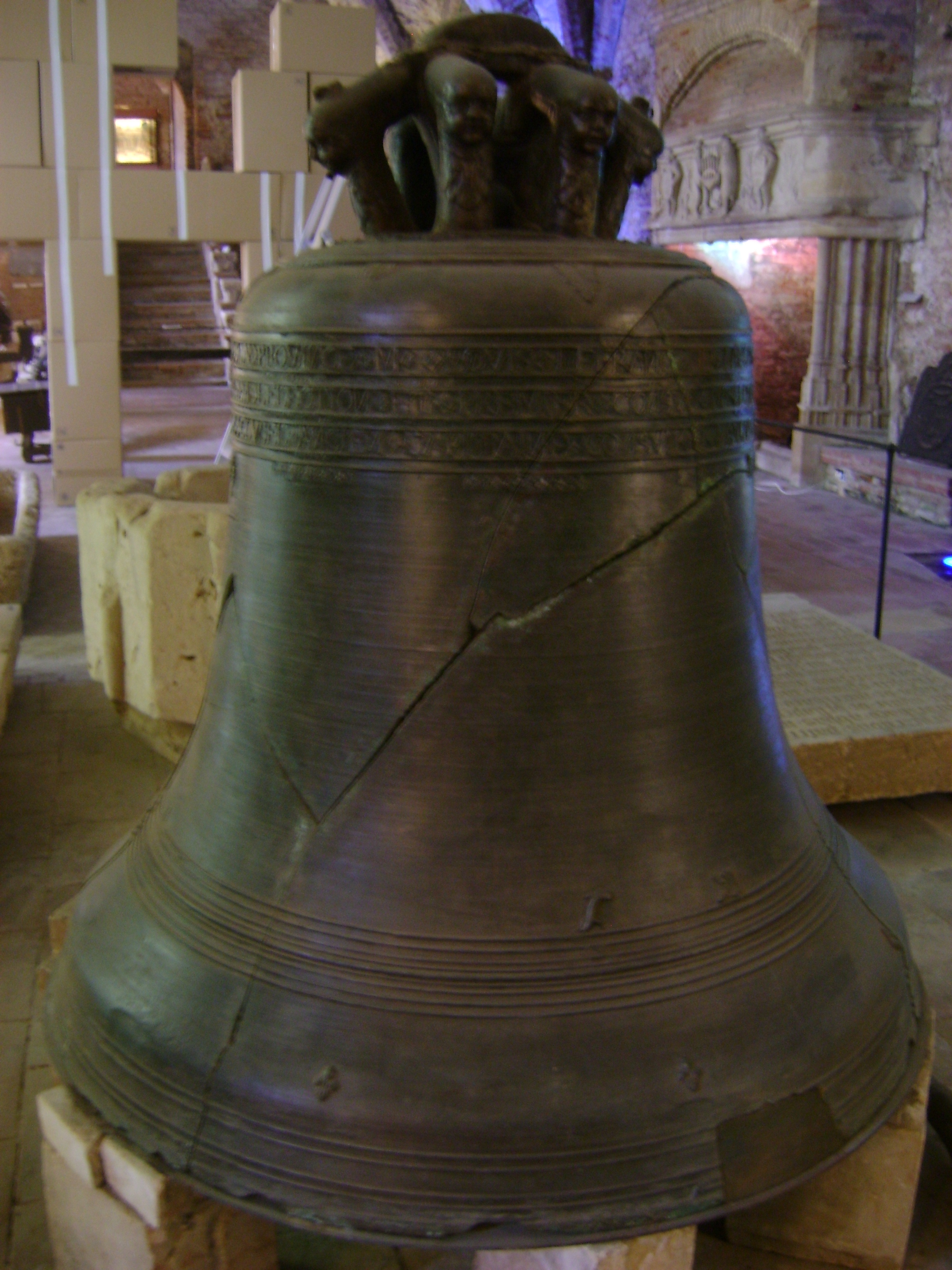 Musée Ingres, Montauban, Tarn-et-Garonne. Ancien palais épiscopal, ancien Hôtel de Ville. .